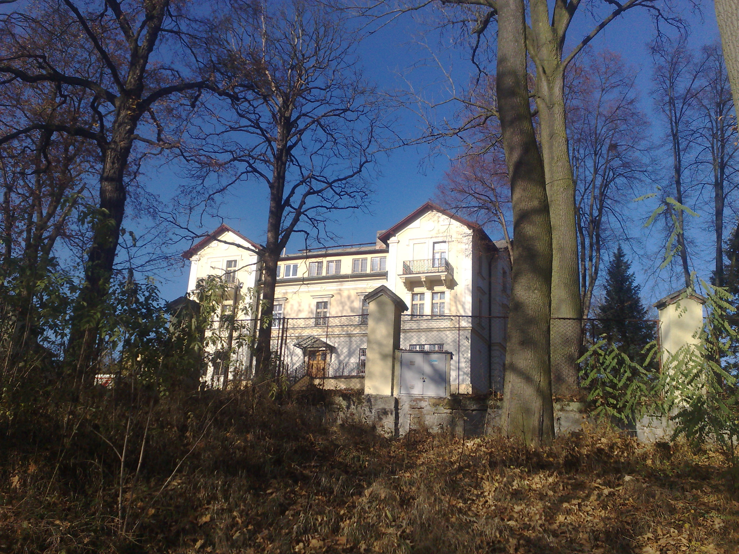 Budova v bývalých lázních Šternberk, okres Kladno.